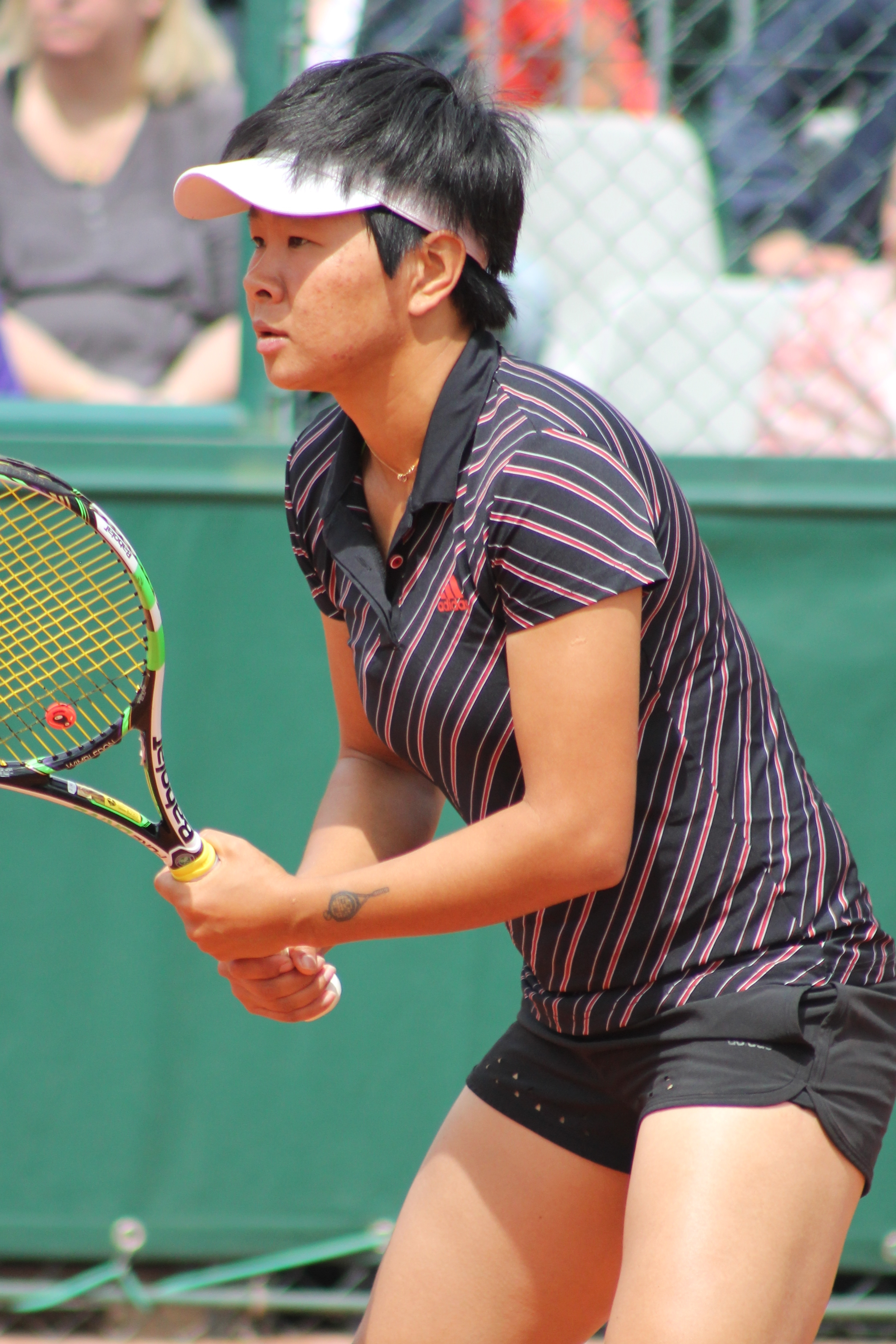 Liang RG15 (5)